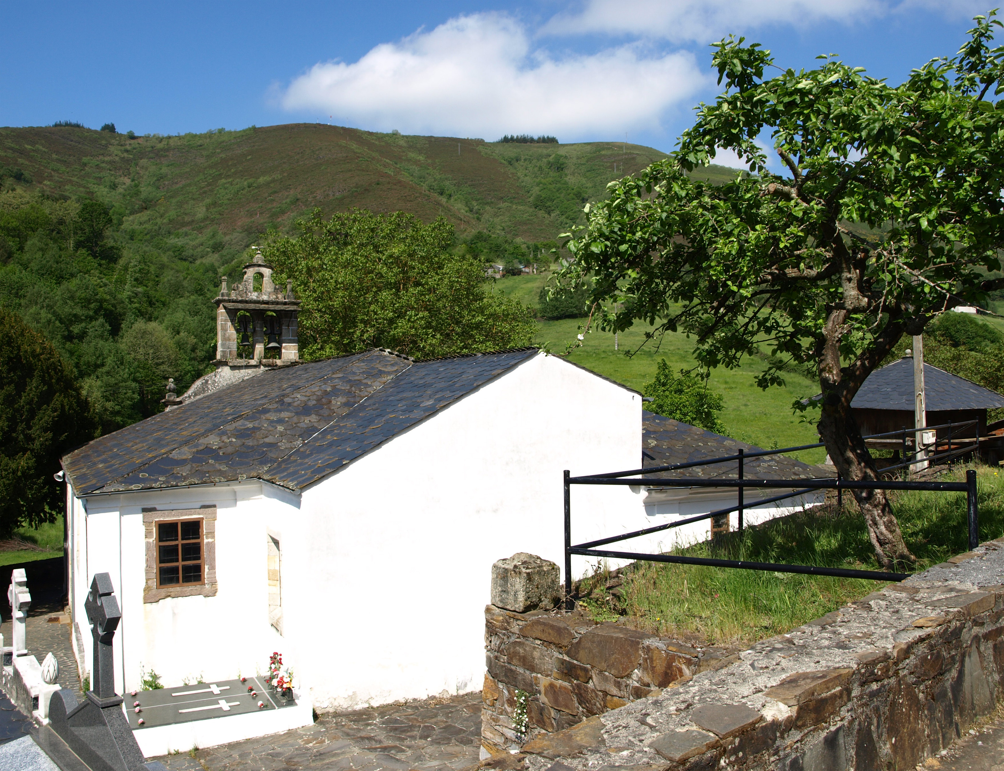 Igrexa parroquial de Córneas (Baleira)